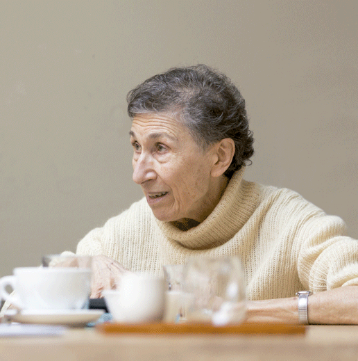 Silvia Federici ikertzaile, idazle, irakasle eta ekintzaile feminista